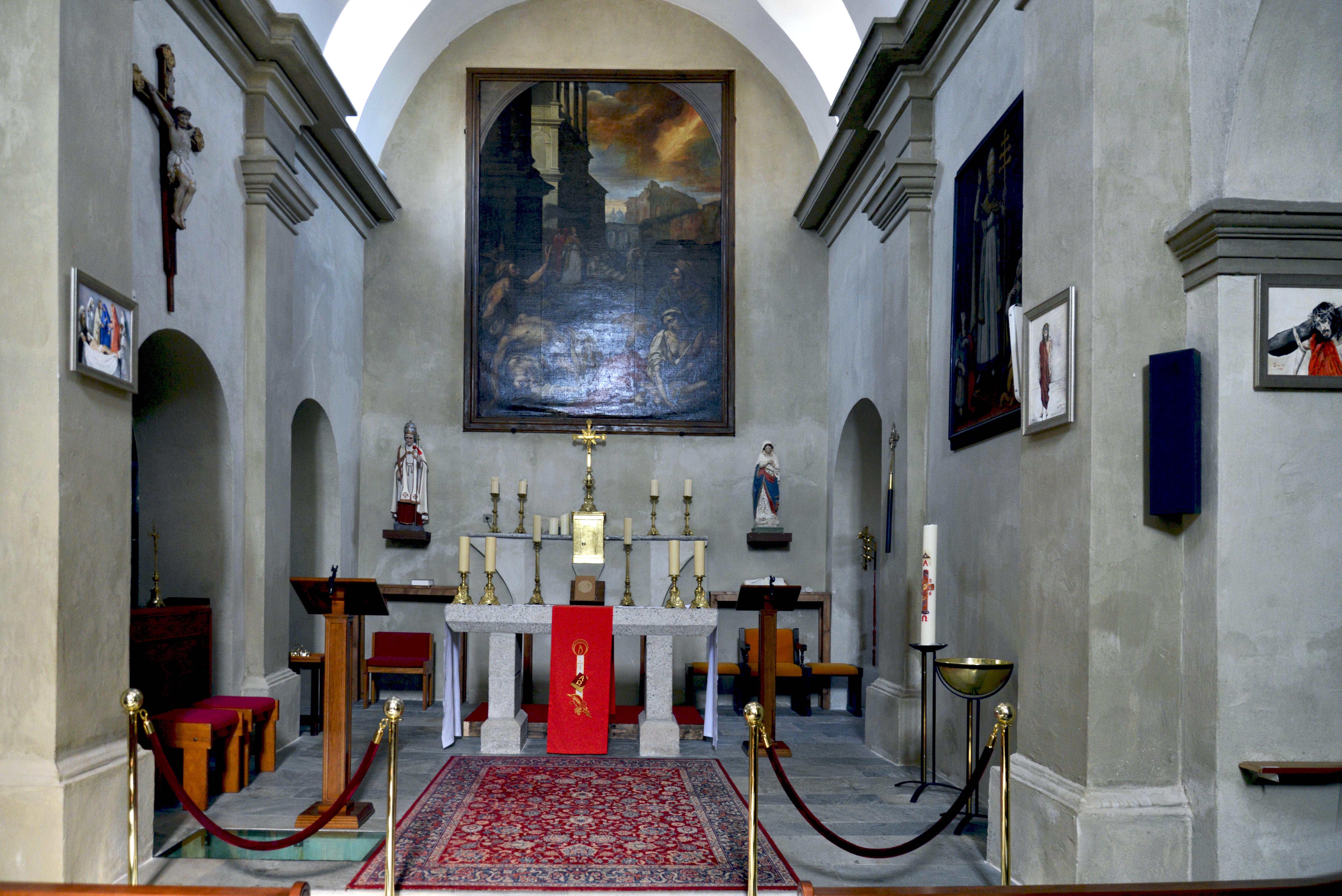 Aléria, Plaine orientale (Haute-Corse) - Chœur de l'église paroissiale San Marcello .